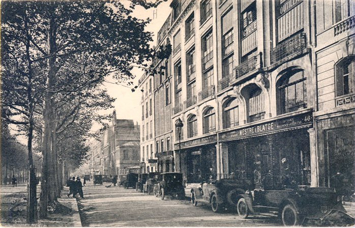 carte postales 46 avenue de la grande armée : magasin de pièces Mestre et Blatgé